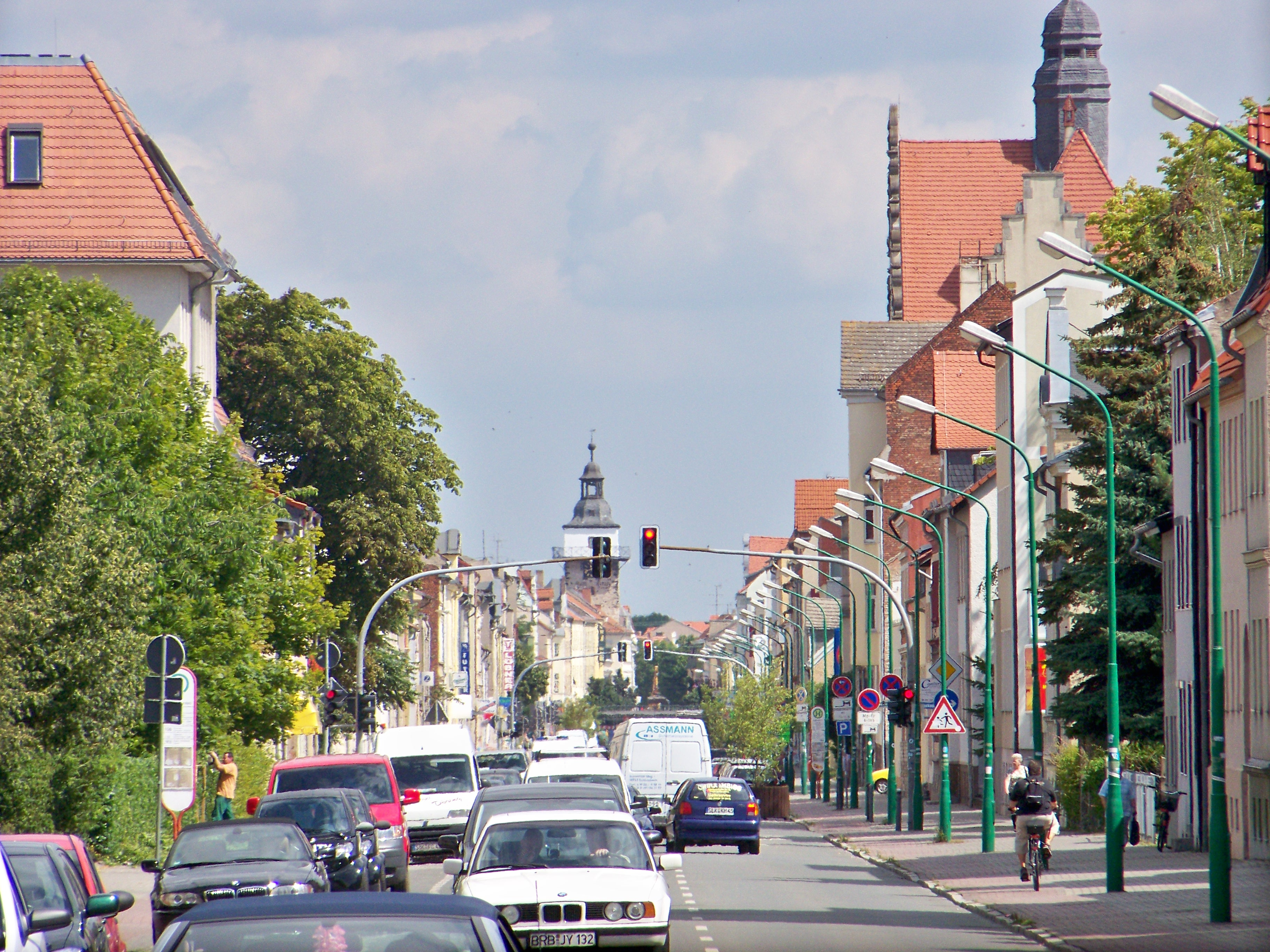 Friedrichstraße in Schönebeck (Elbe)